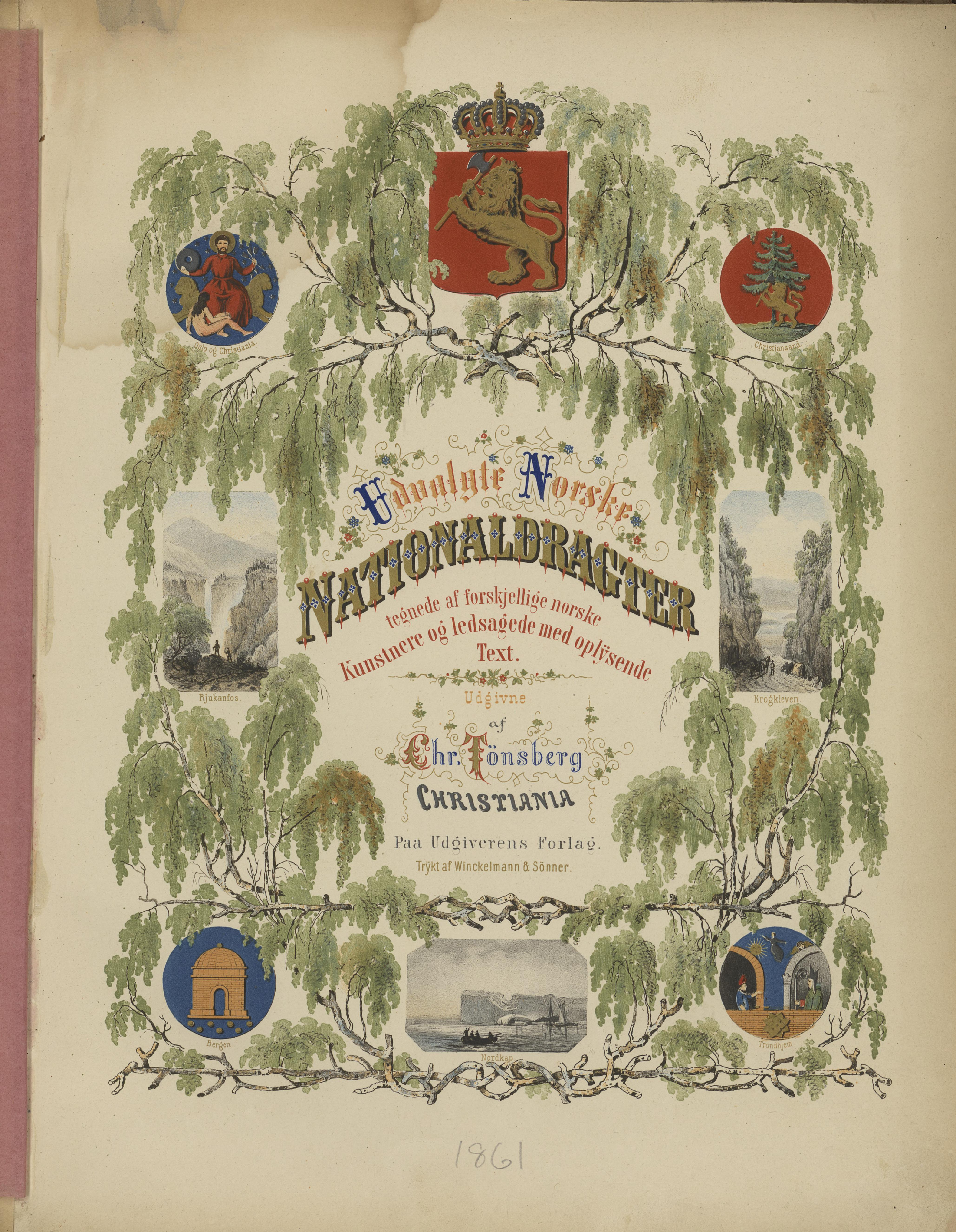 Illustrasjon hentet fra boken "Udvalgte norske Nationaldragter" av ukjent forfatter og utgitt av Chr. Tønsberg (no, [1861])